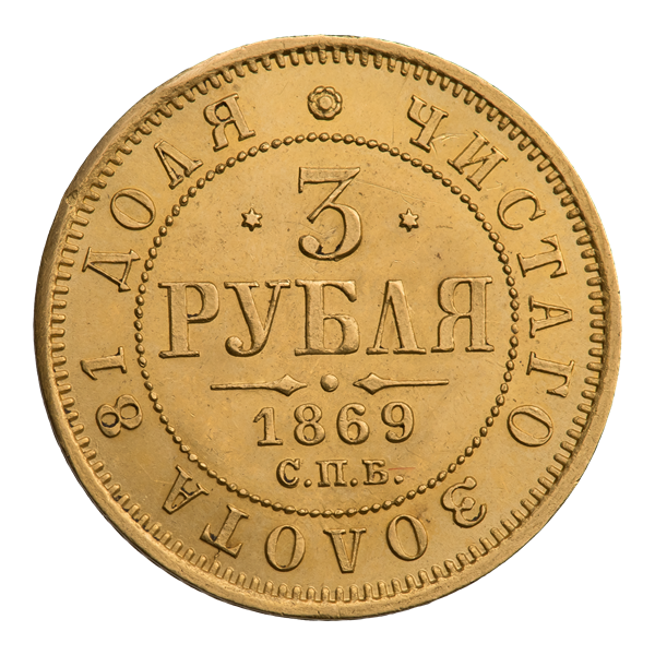 Три рубля 1869 г. (реверс). ГМ 298.XV.2; Биткин 31 (R). Внутри точечного ободка обозначение номинала: * 3 * РУБЛЯ; под фигурной чертой дата: 1869 и обозначение монетного двора: С. П. Б. Круговая надпись: ЧИСТАГО ЗОЛОТА 81 ДОЛЯ *